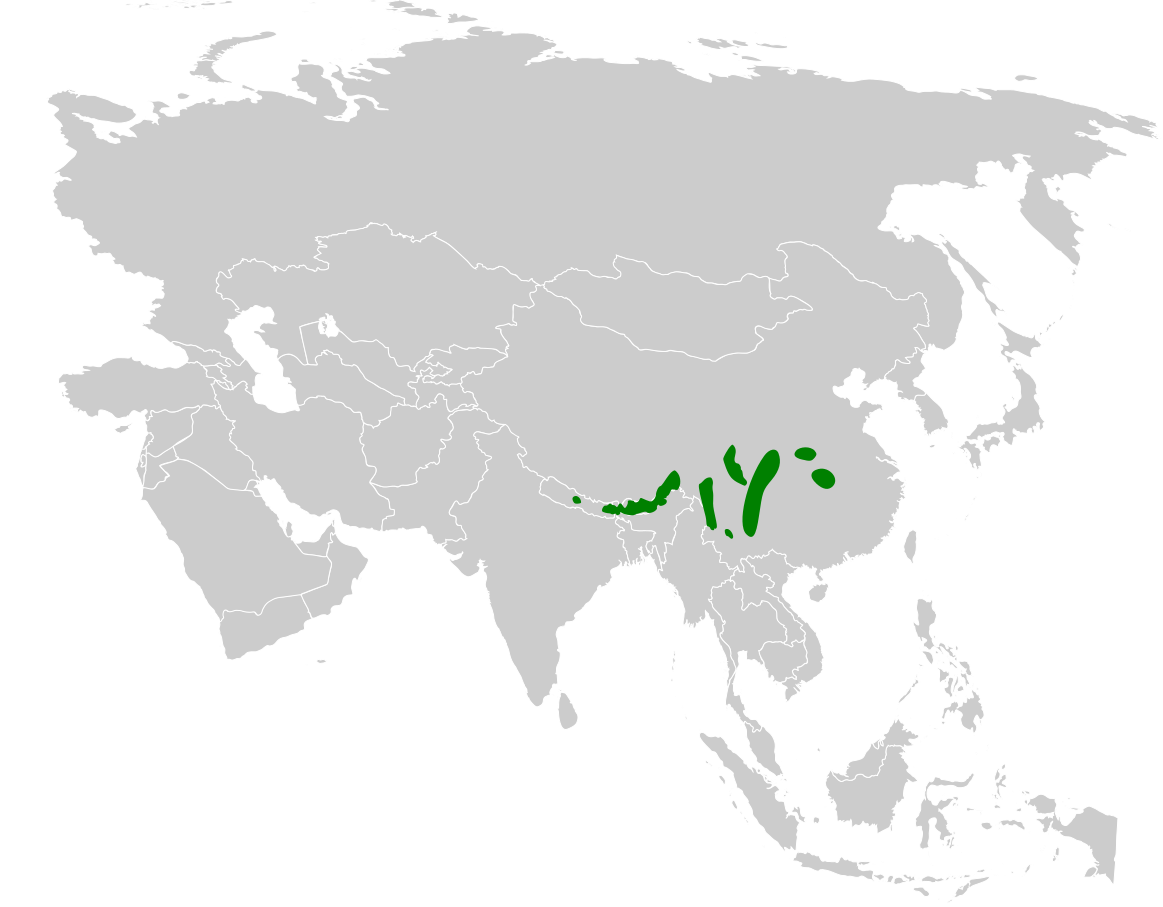 Cholornis distribution map